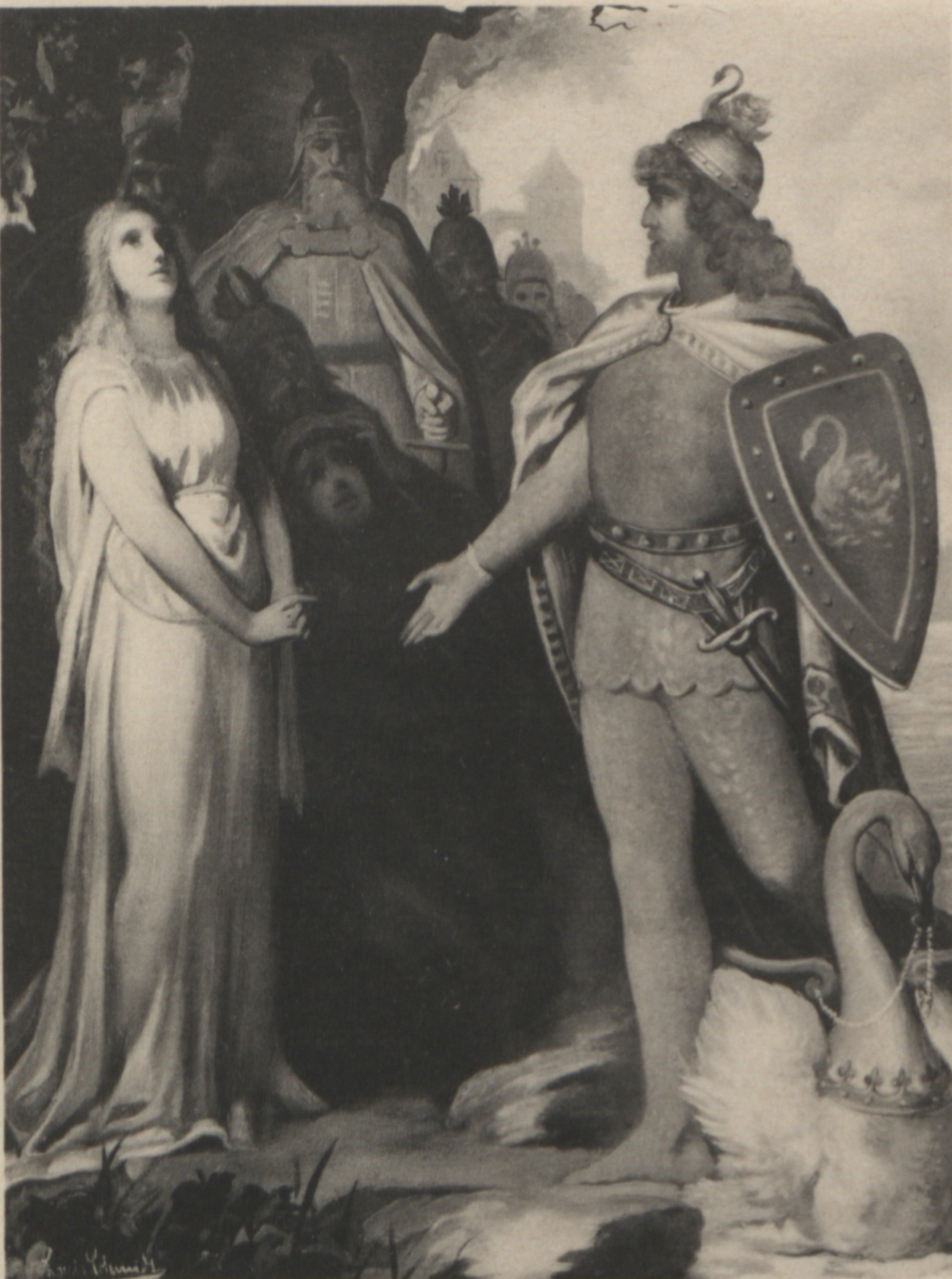 In: Rheinlands schönste Sagen und Geschichten. Für die Jugend. Berlin: Tonger & Greven, 1886